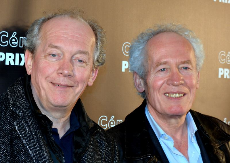 les frères Dardenne (Luc à gauche, Jean-Pierre à droite) à la cérémonie des prix Lumières